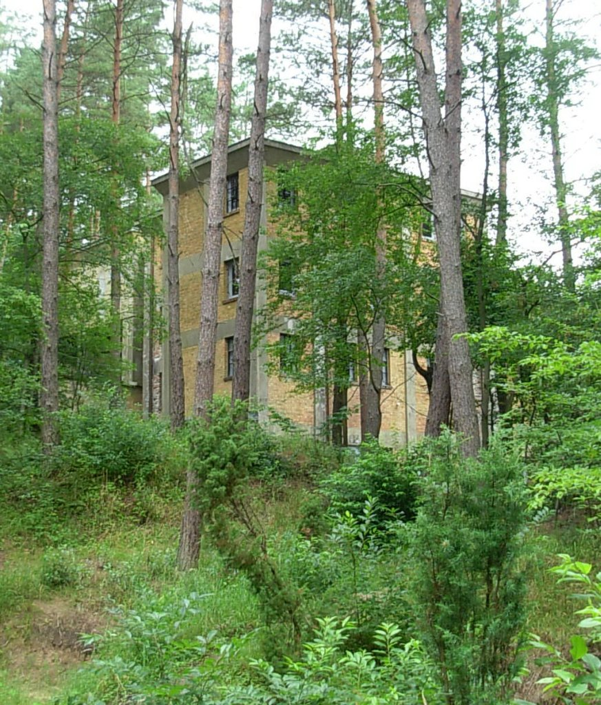 Eksploseum w Bydgoszczy - jeden z budynków NGL-Betrieb